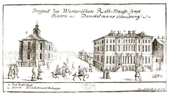 Ansicht des Friedrichswerderschen Rathauses und des Hauses Dankelmann, um 1690.